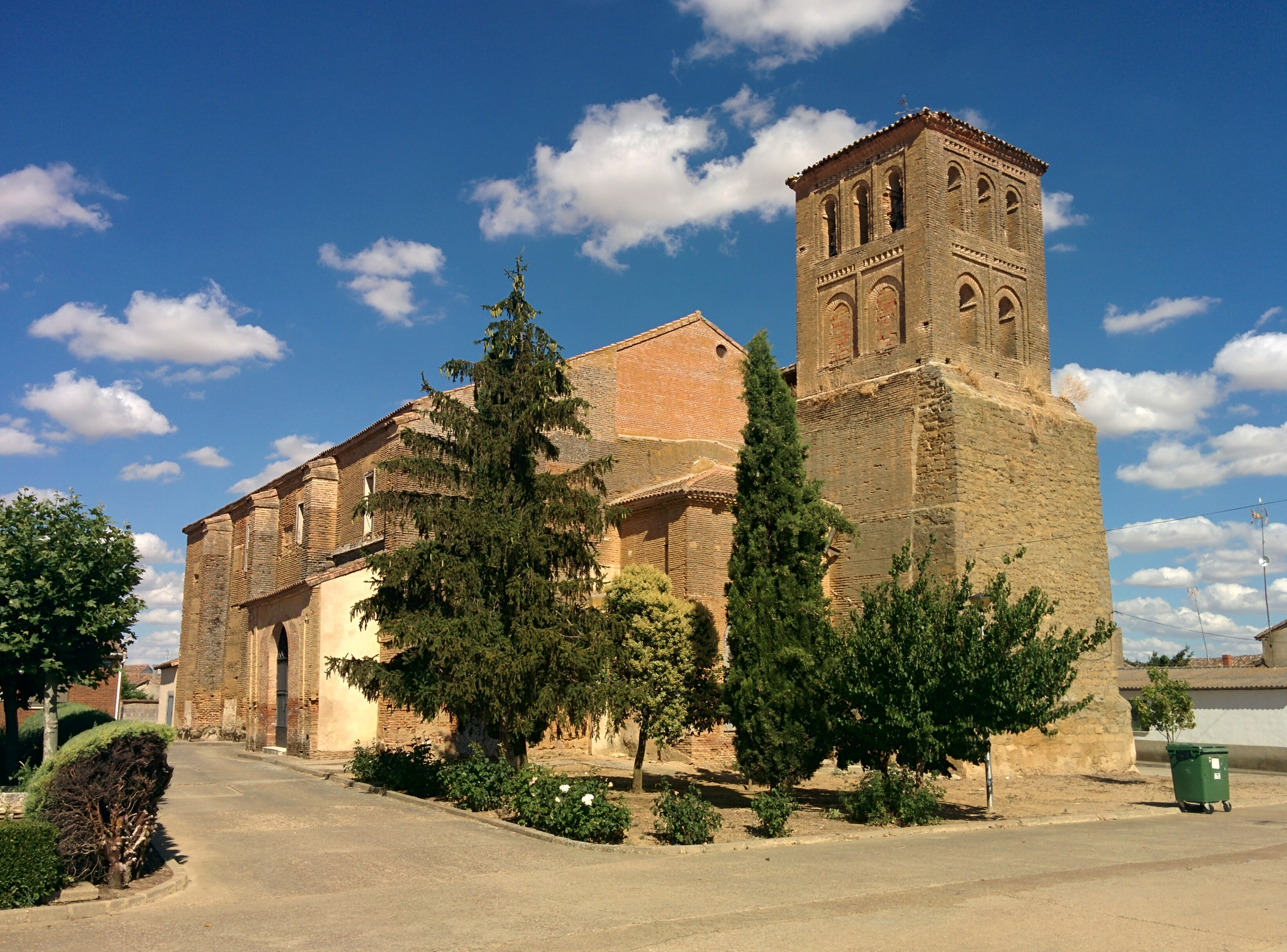 Iglesia de Santa María, en Boadilla de Rioseco (Palencia, España).